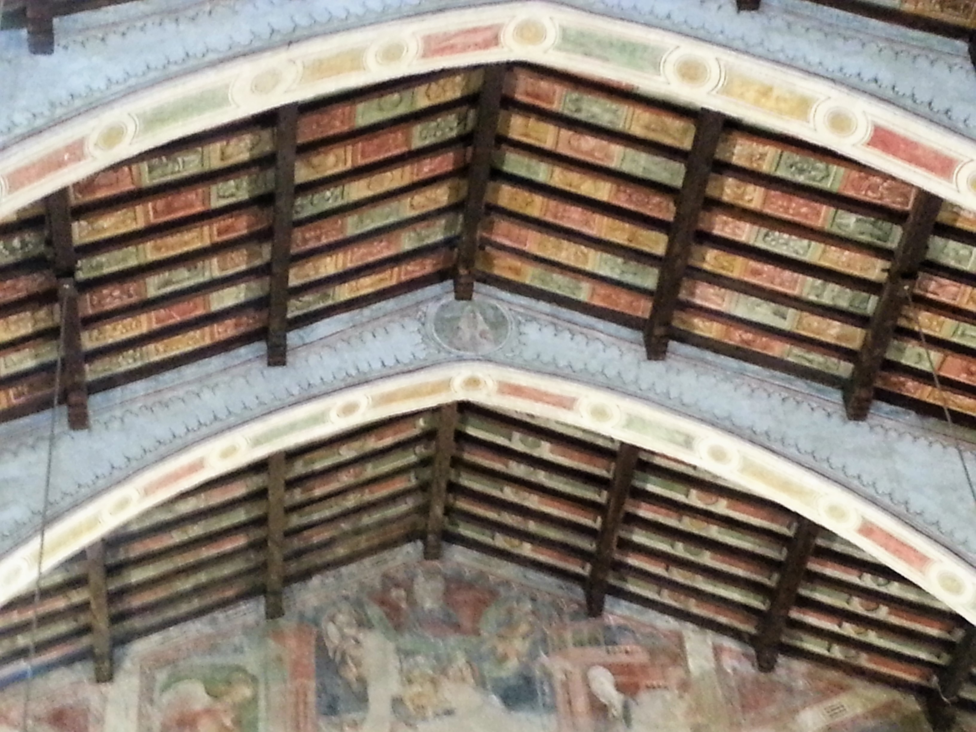 Soffitto a tavolette della chiesa di sant'Agostino ora Aula Magna dell'università di Bergamo